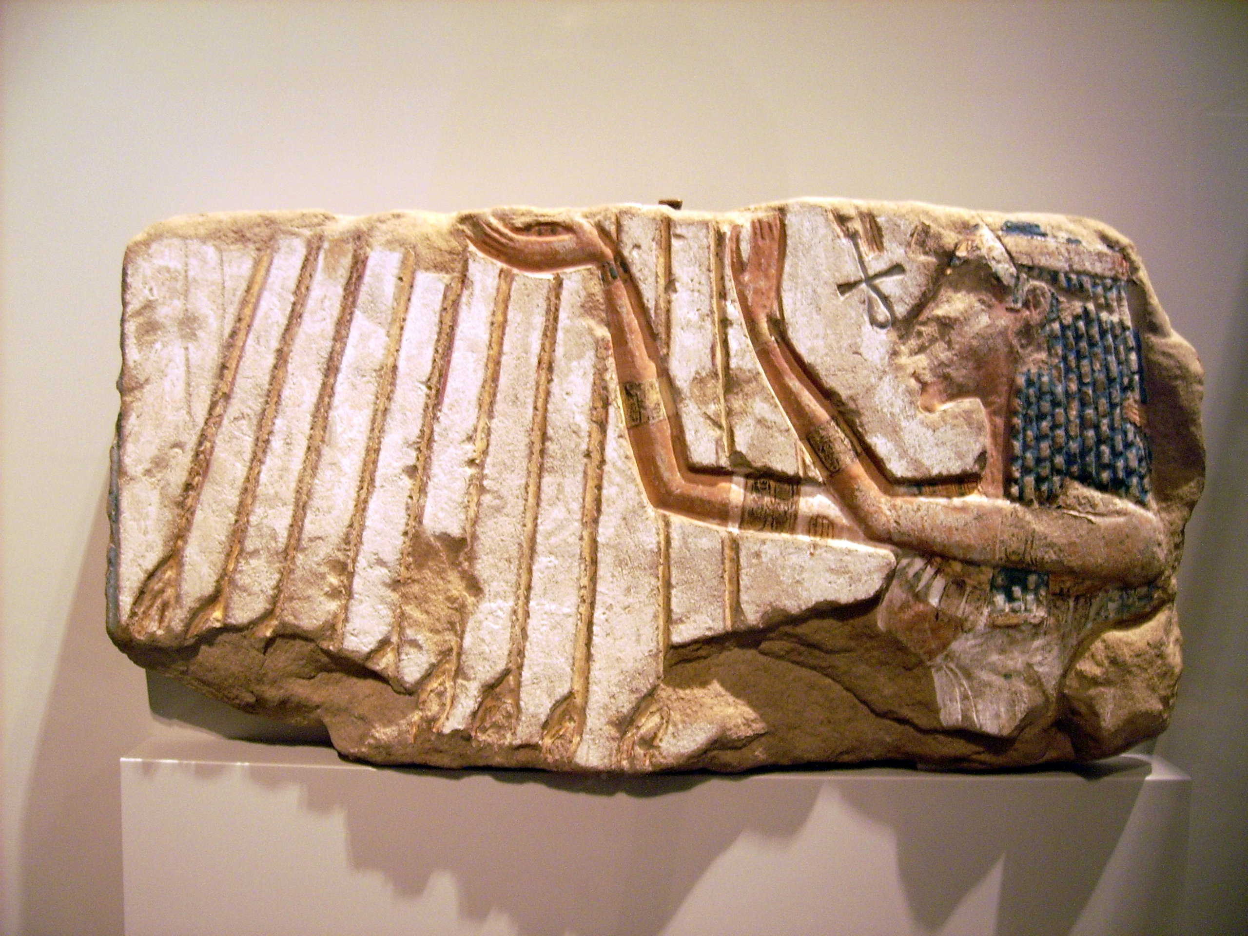 Relieffragment: Noftretete vor Strahlenaton; Neues Reich, 18. Dynastie, um 1350 v. Chr.; Aton-Tempel in Karnak; Sandstein; Inv-Nr. 312843 - Ägyptisches Museum Berlin/Altes Museum